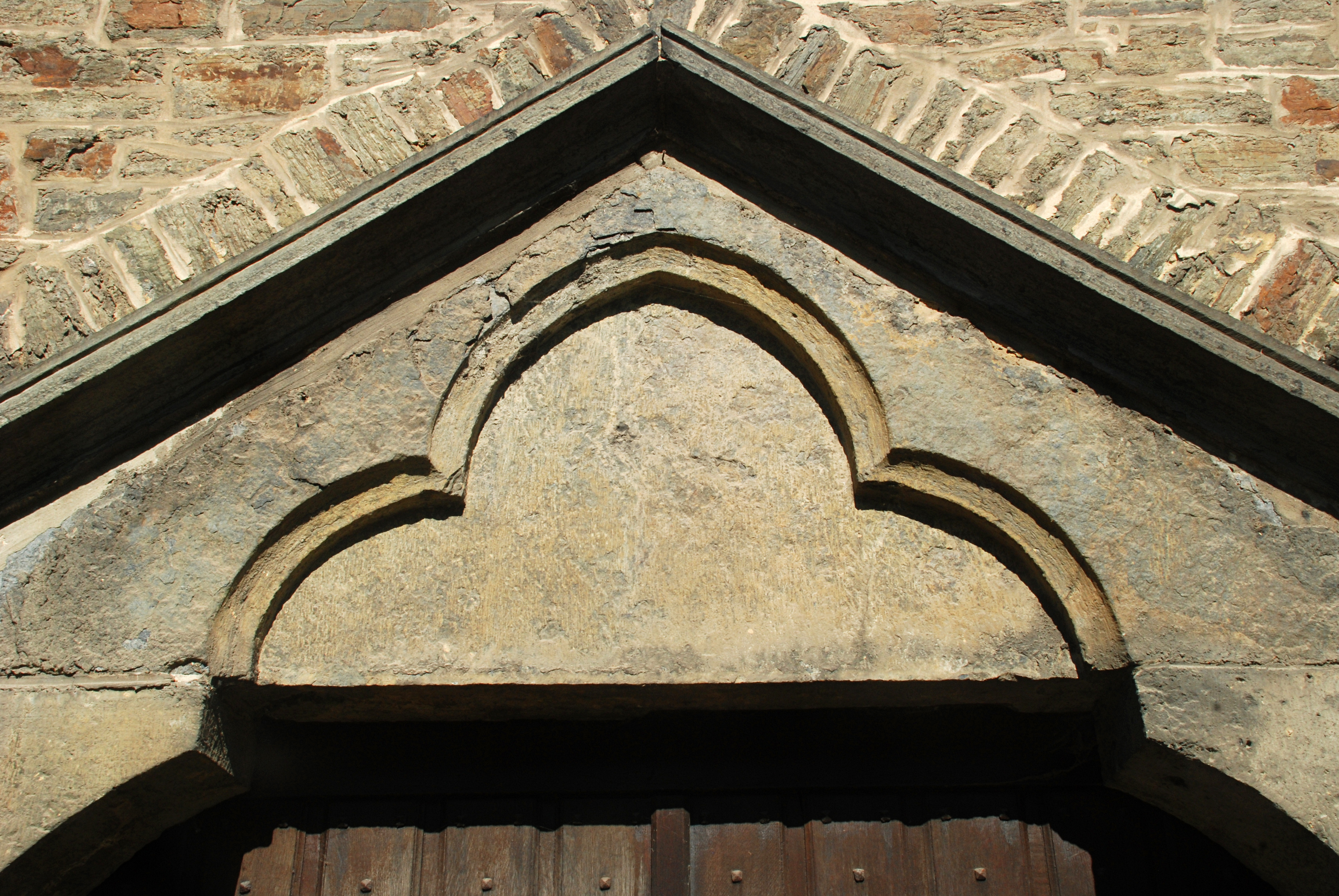 Belgique- Brabant wallon - Villers-la-Ville - ancien moulin abbatial